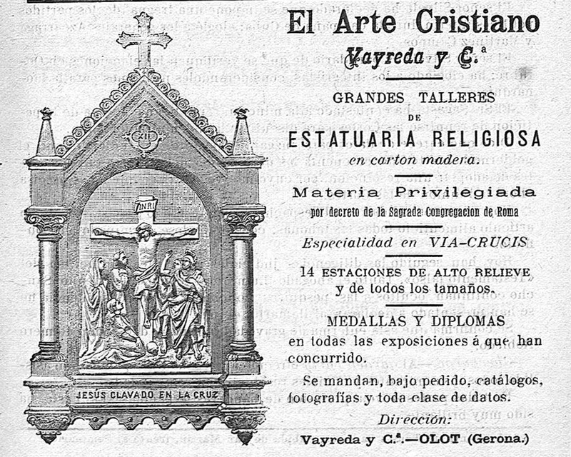 Folletín de propaganda de El Arte Cristiano fundado por Joaquim Vayreda en Olot.1895